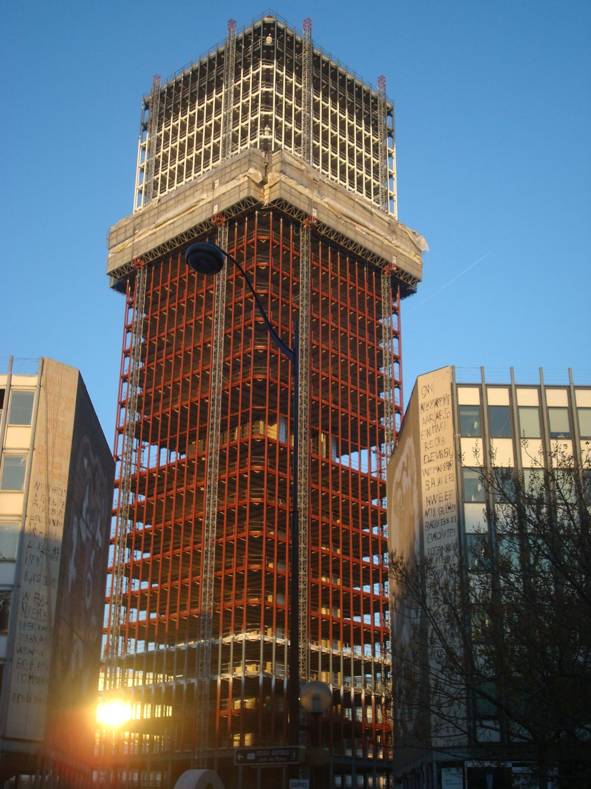 Jussieu désamianté